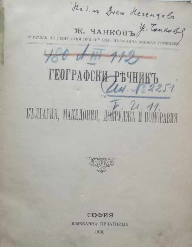 Географски речник на България, Македония, Добруджа и Поморавия. С., 1918.